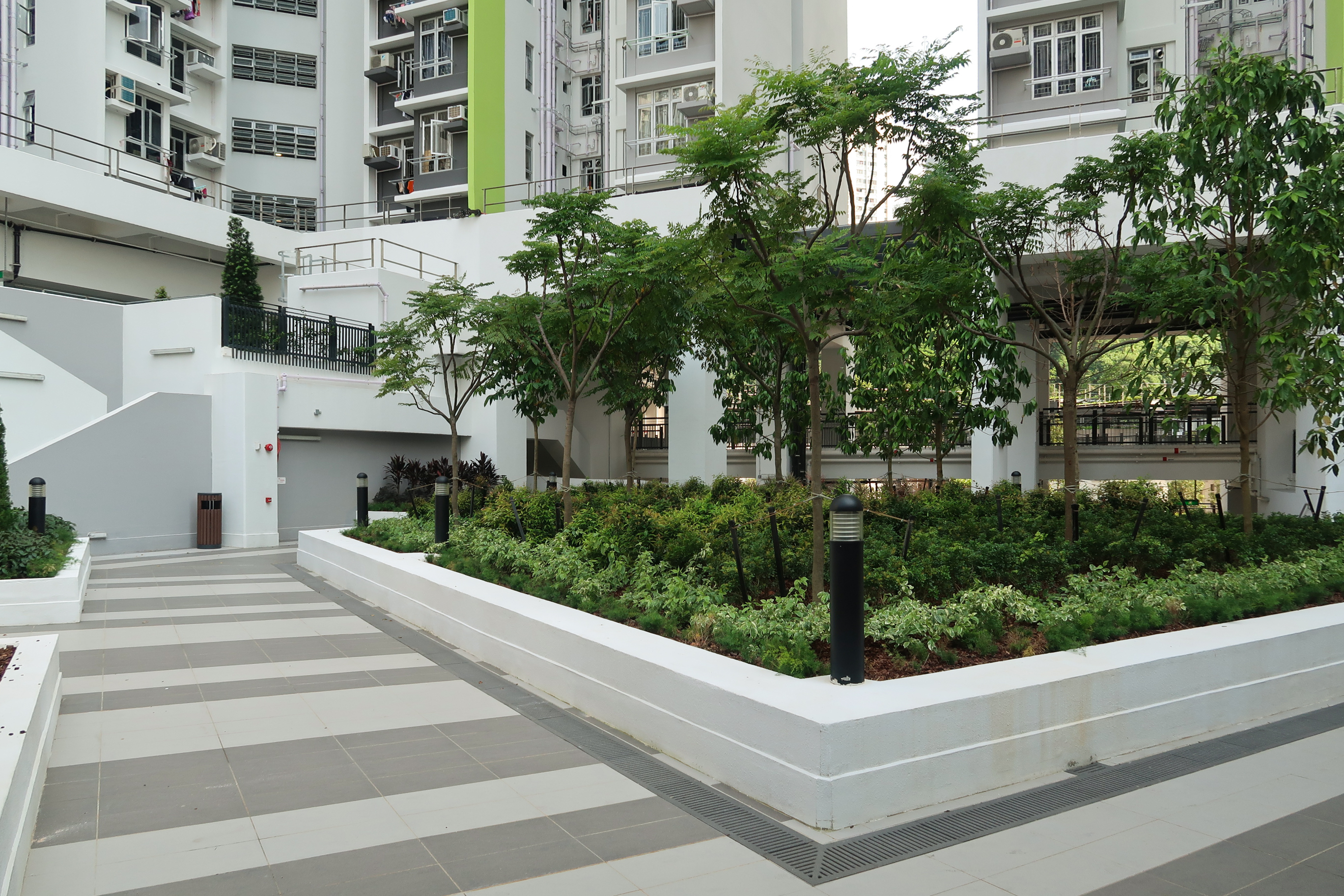 Kwai Tsui Estate P1 Garden